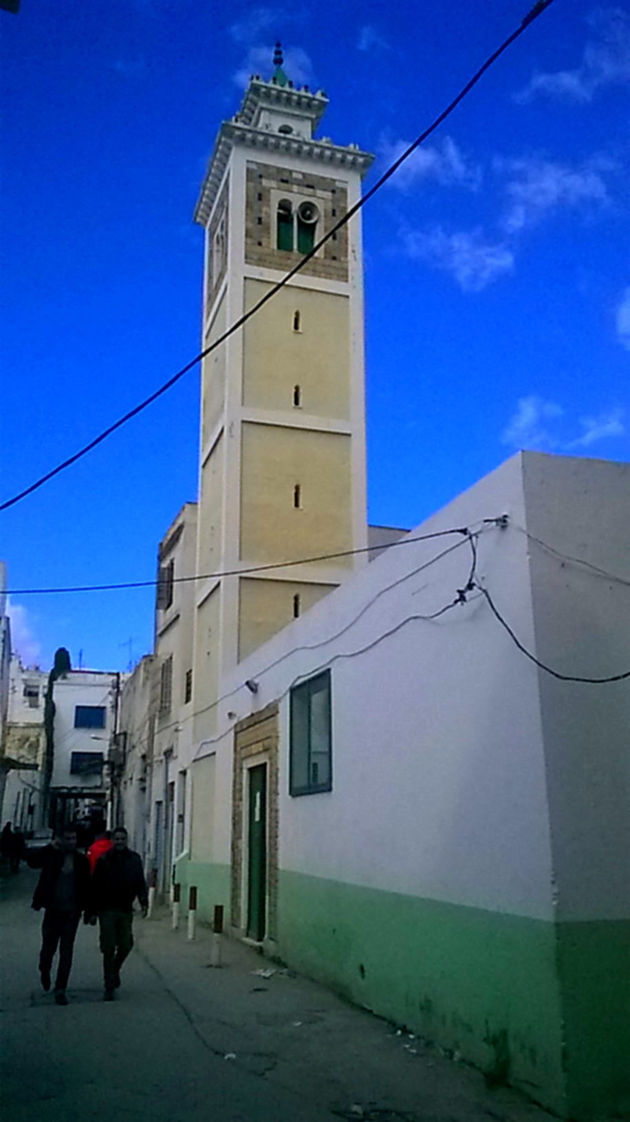 Rue Tronja, Bab Souika, Tunis نهج ترنجة، باب سويقة ،تونس العاصمة